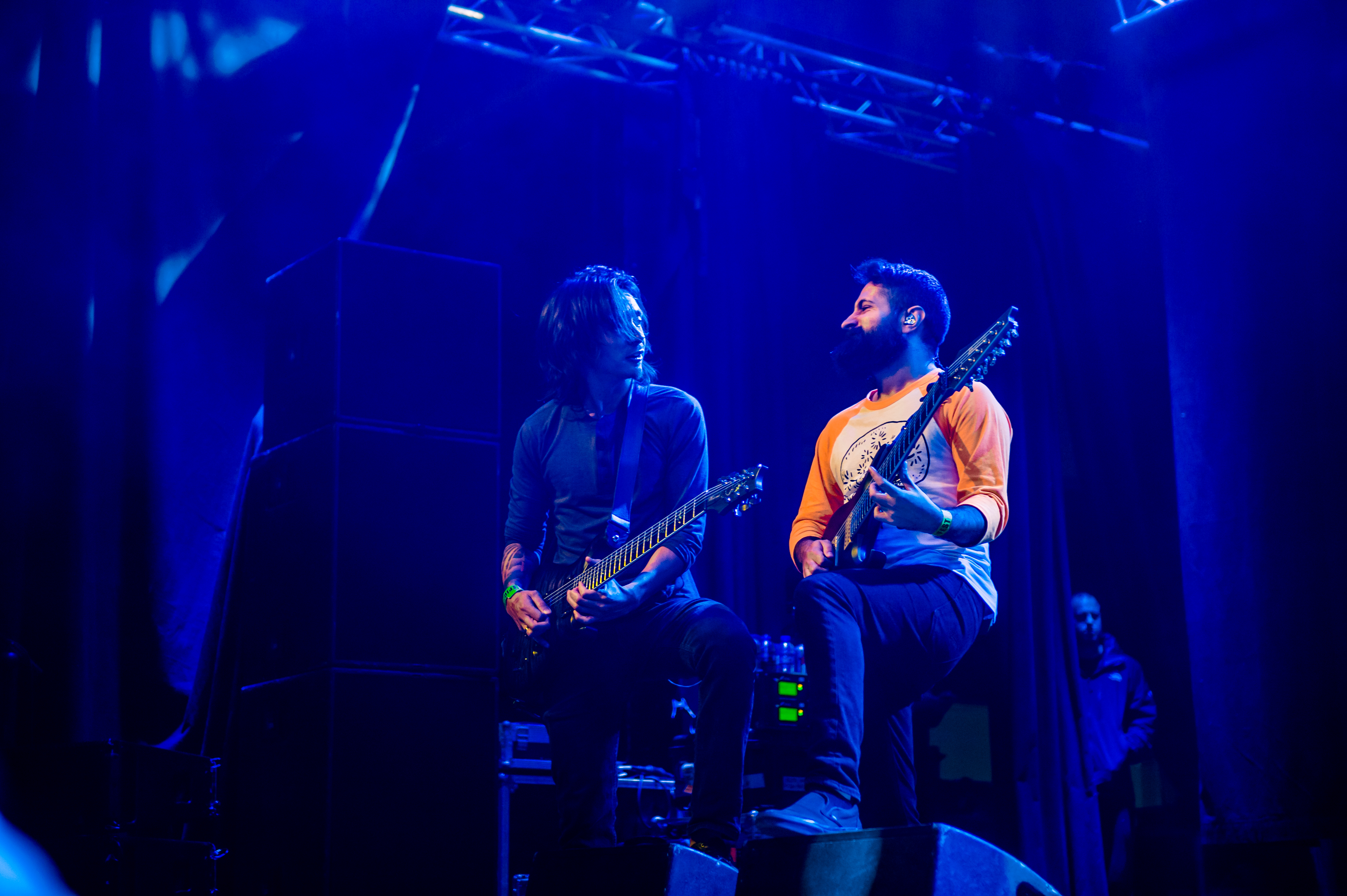 'Periphery - Epic Metal Fest - Eindhoven'